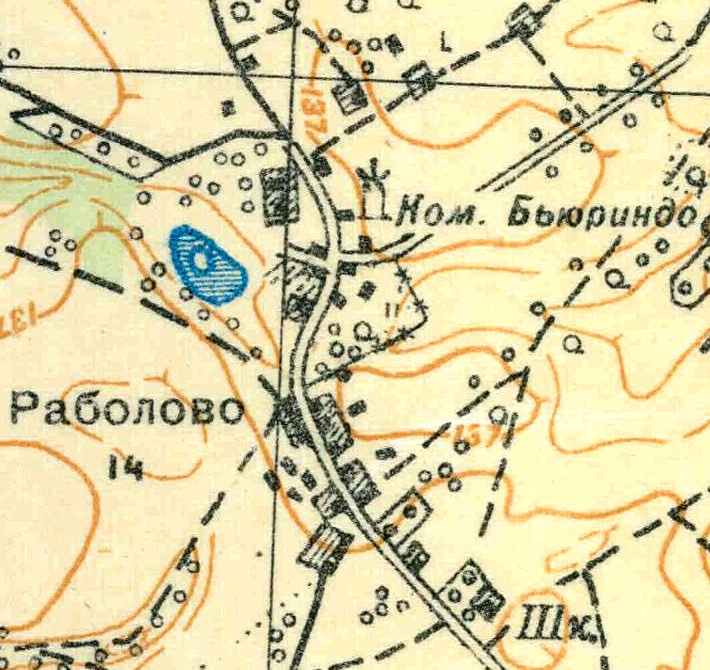 Топографическая карта Ленинградской области, квадрат О-35-24-А-г (Горки), деревня Раболово